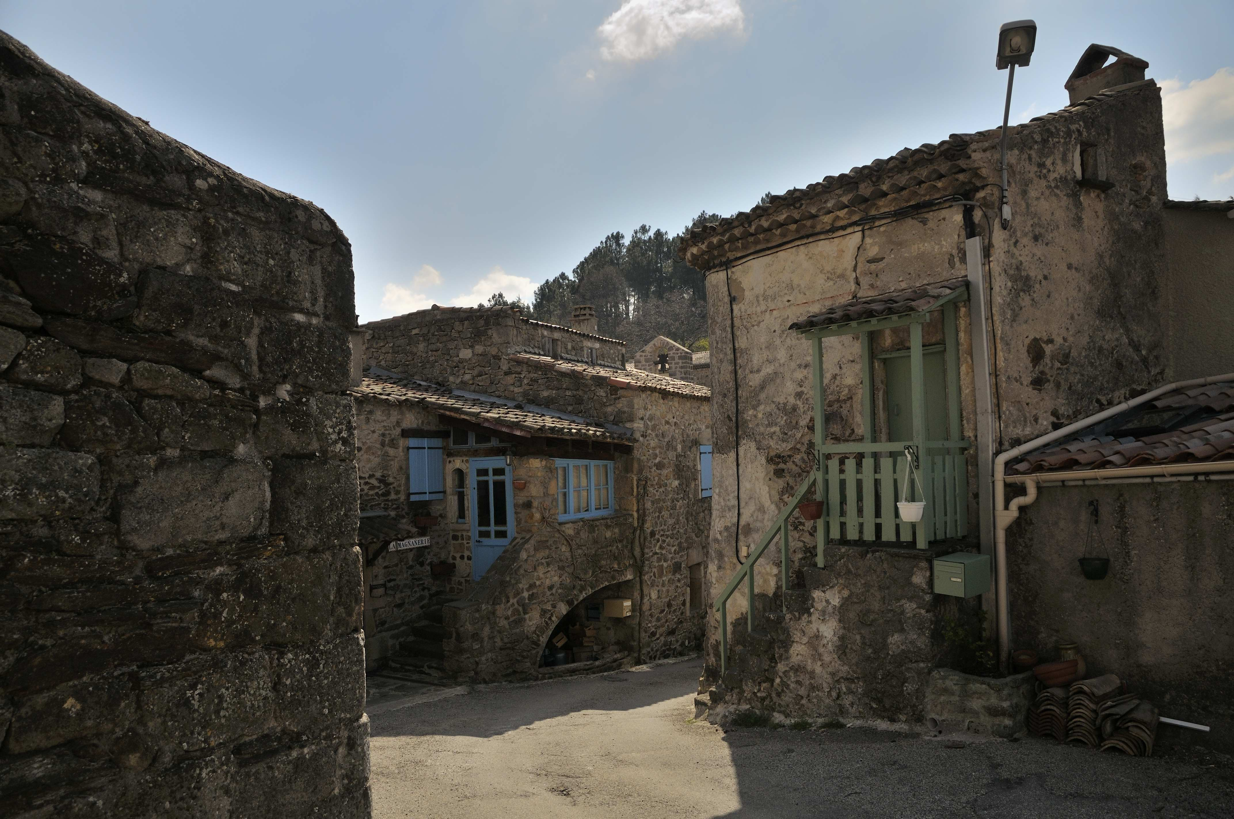 rue du village